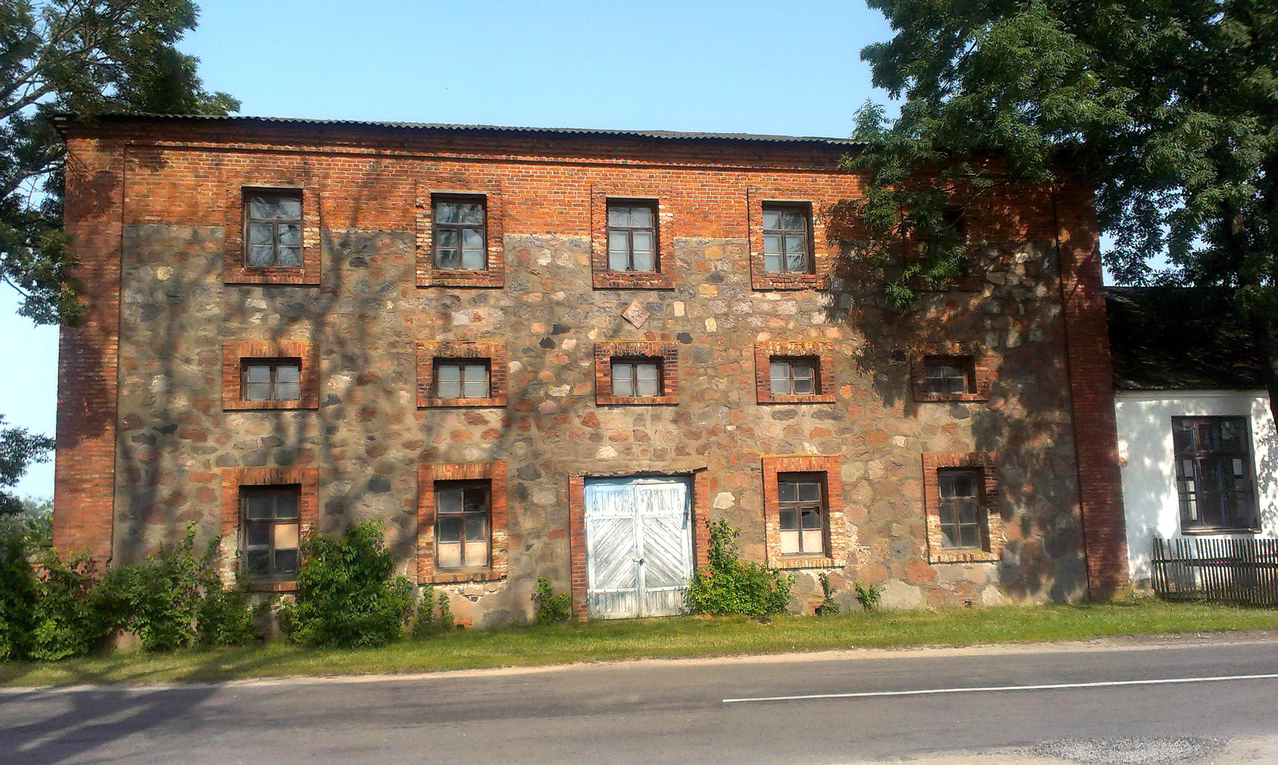 Свіран у Вярховічах